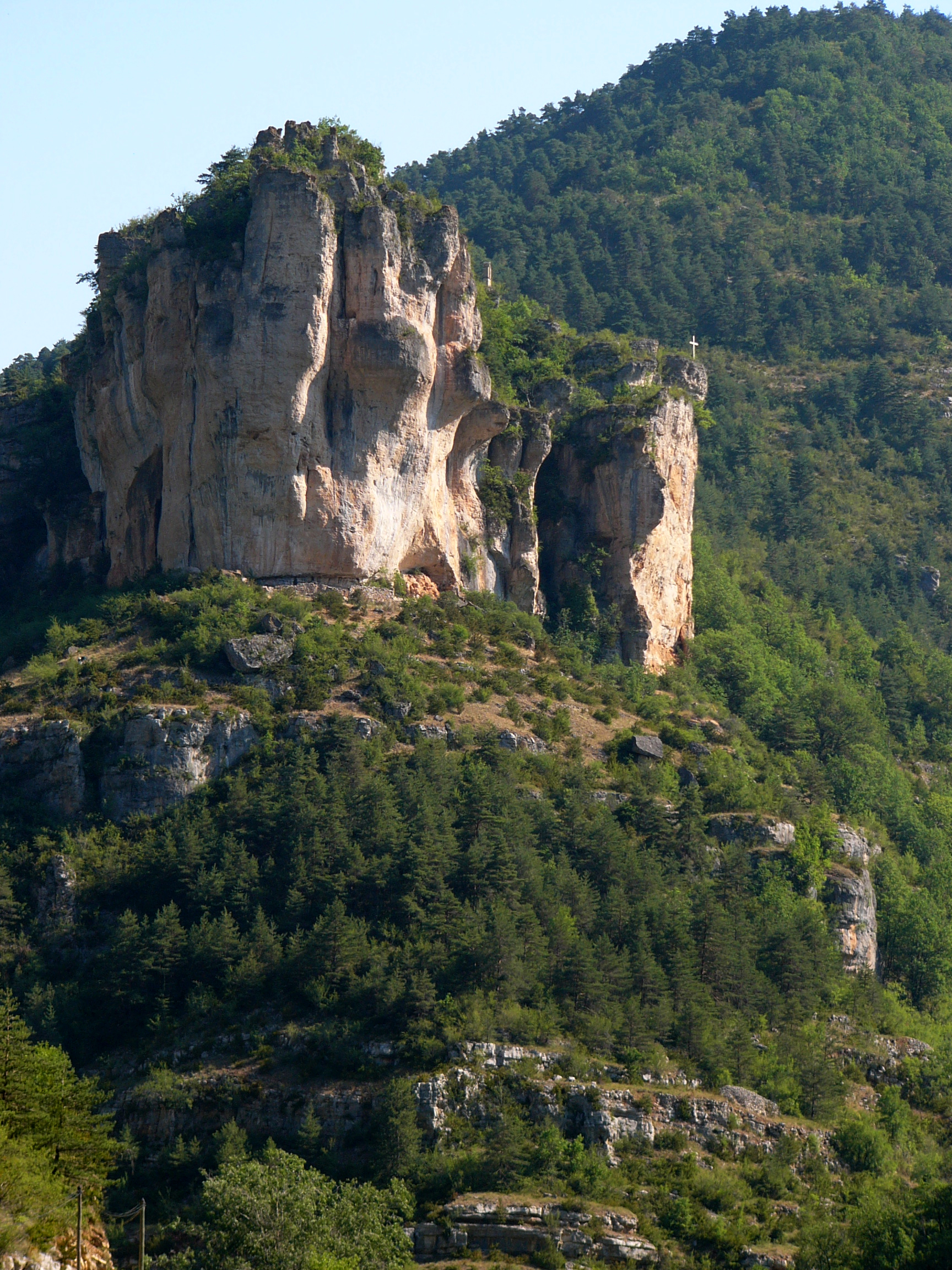 Gorges de la Jonte